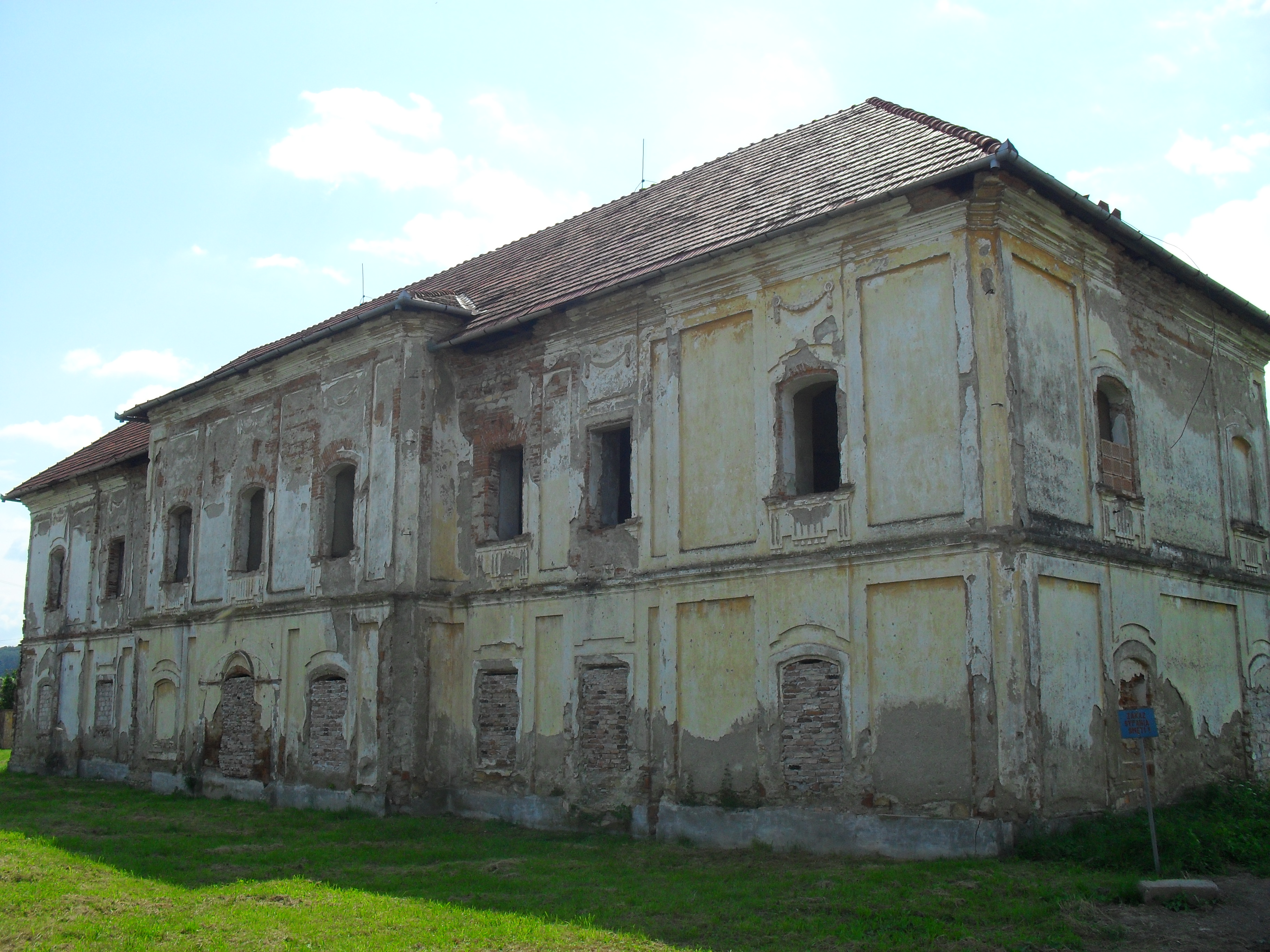 Gömörfalva - kastély